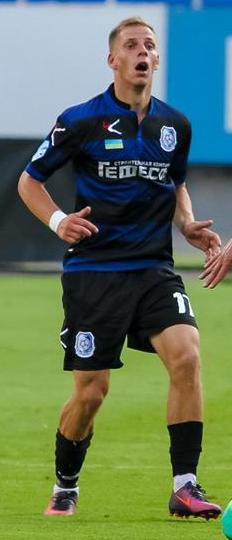 Микита Татарков - український футболіст